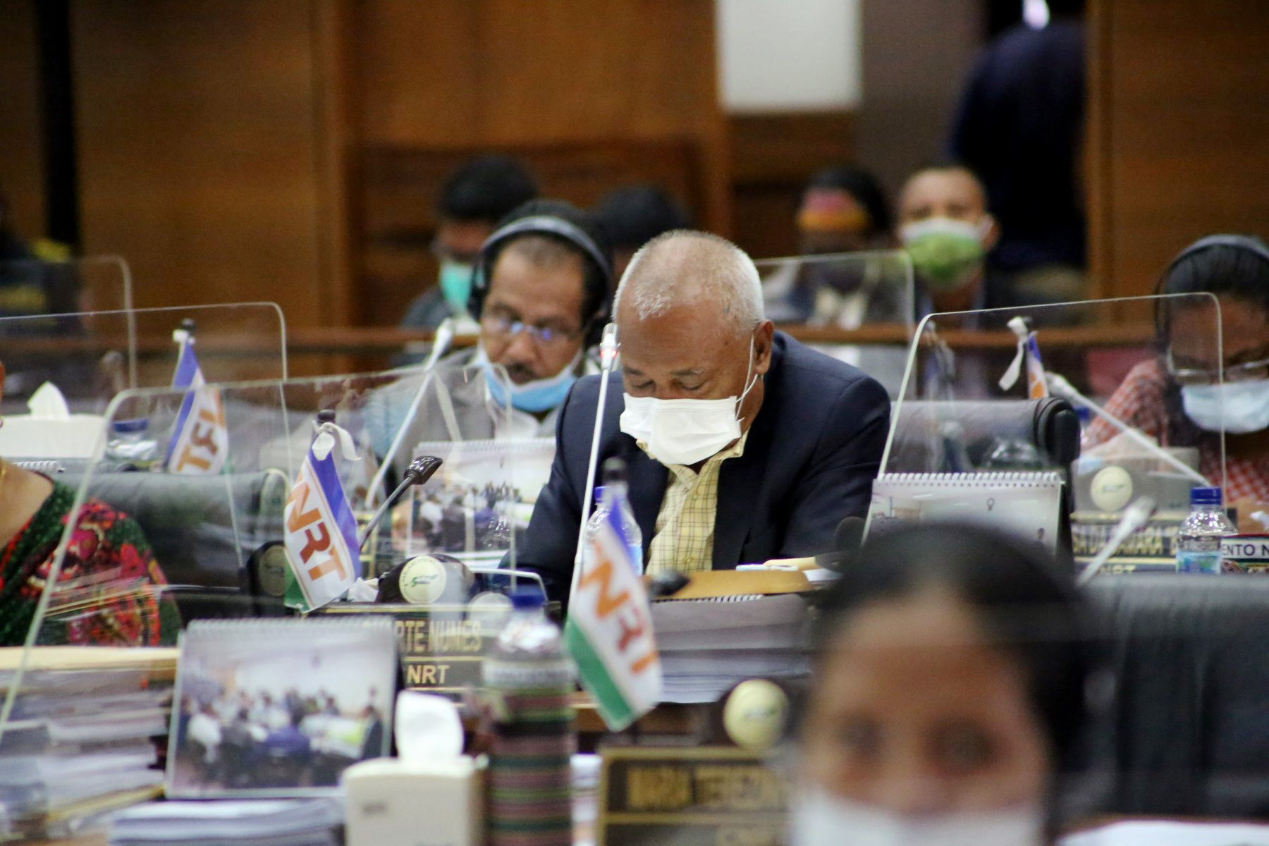 Duarte Nunes in der Sitzung zur Verlängerung des Ausnahmezustandes im Nationalparlament Osttimors